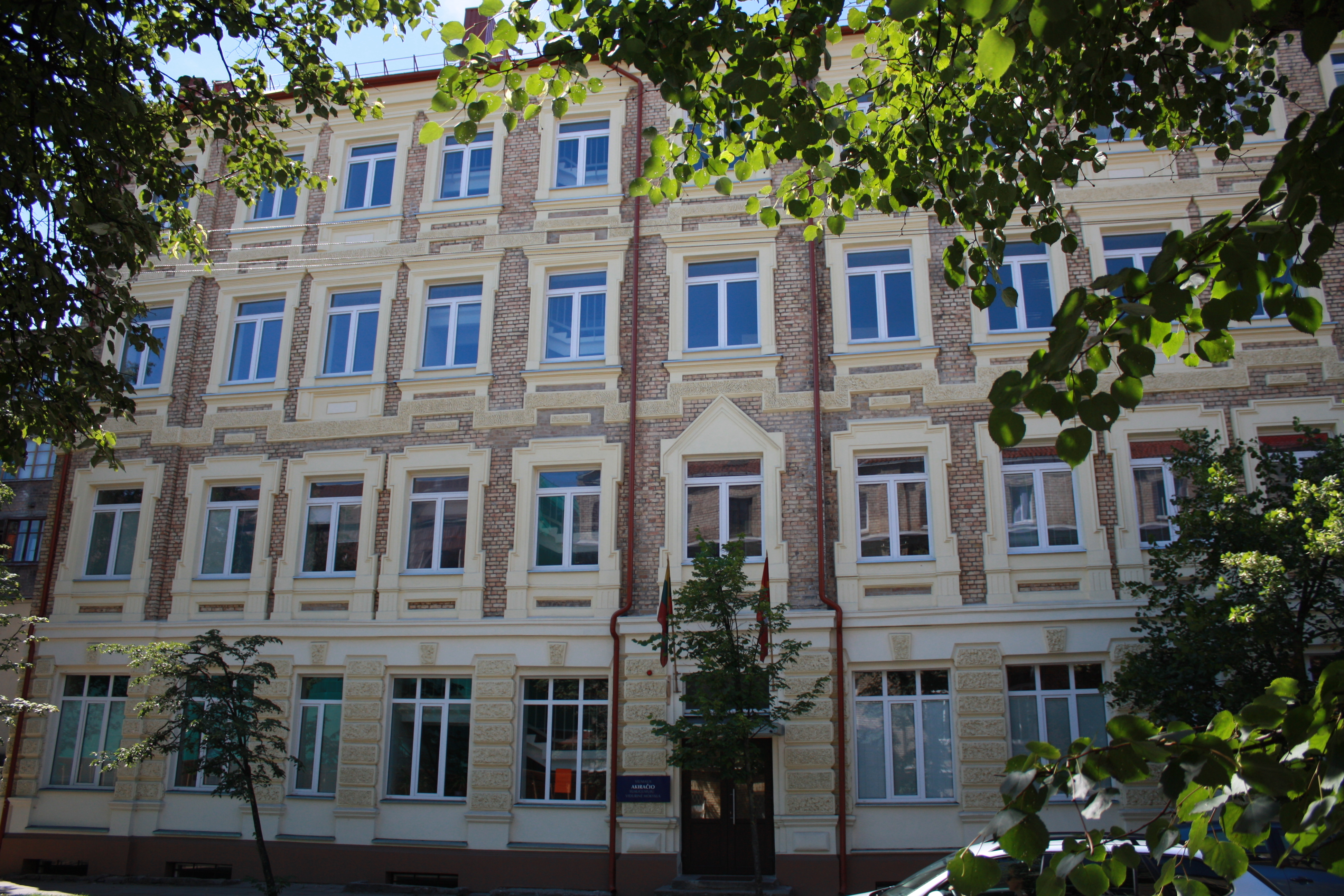 Vilniaus Akiračio suaugusiųjų vidurinė mokykla